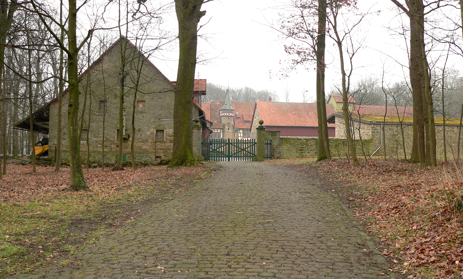 Rittergut Wichtringhausen